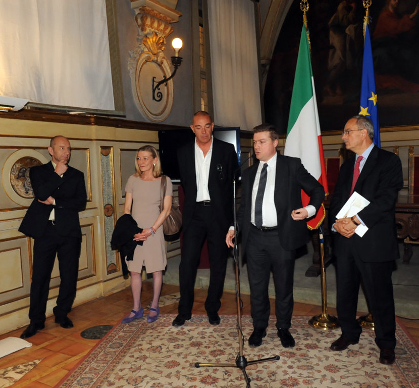 La foto ritrae il professor Marco Peresani, la professoressa Silvia Grandi, Andrea Benetti, l'on. Andrea De Maria, l'on. Paolo Fontanelli all'inaugurazione della mostra di Benetti intitolata "VR60768 - anthropomorphic figure", allestita alla Camera dei Deputati.